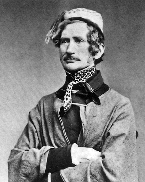 Christian Julius de Meza mit seinem roten Fez und dem gefütterten Schlafmantel über seiner Uniform